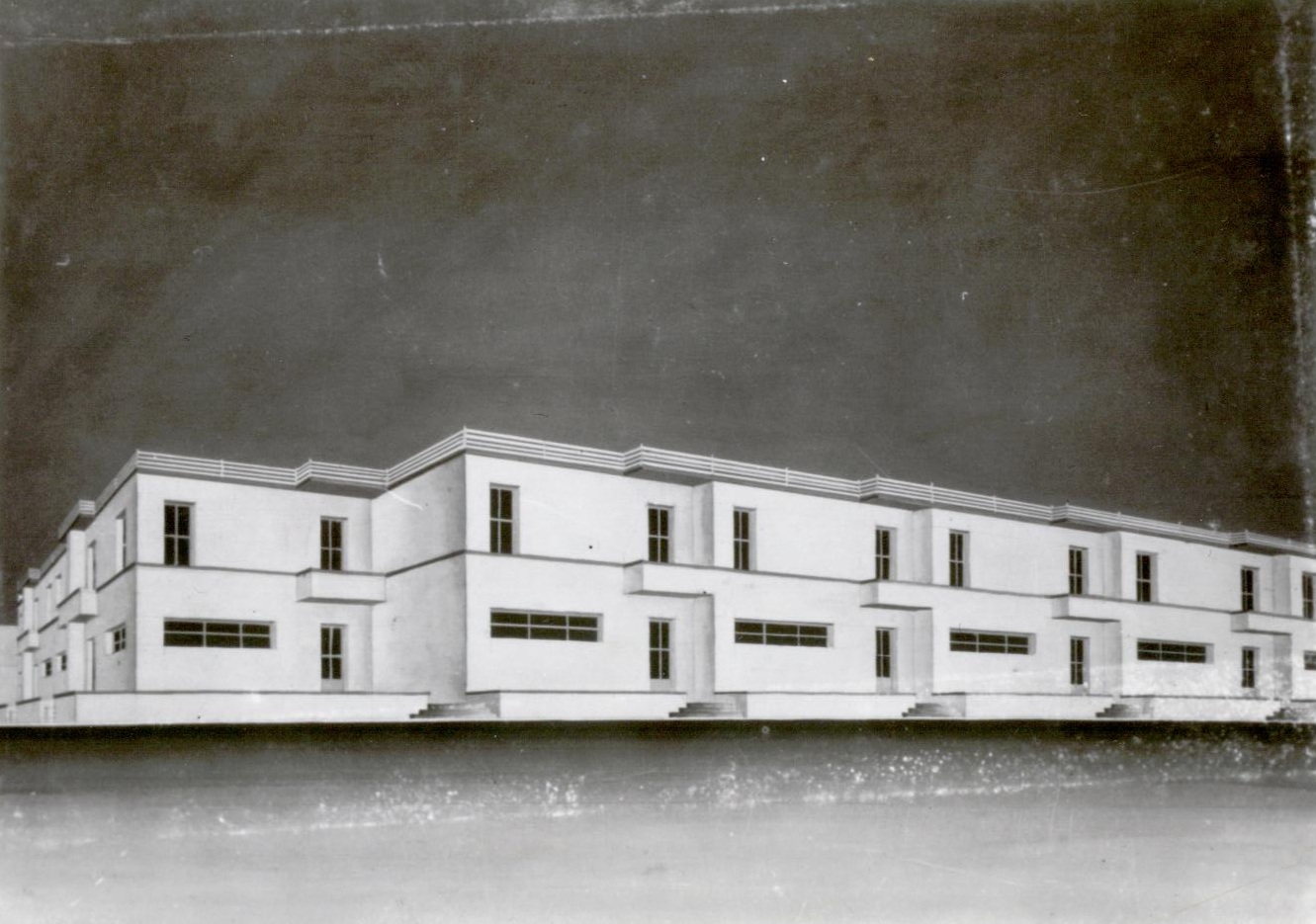 Quadro a tempera del 1931 di Ernesto Lapadula per il Villaggio dei Ceramisti a Seminara (in provincia di Reggio Calabria). File ricavato dalla fotografia fatta da Bruno Filippo Lapadula dall'originale conservato nell'Archivio Lapadula di Roma.